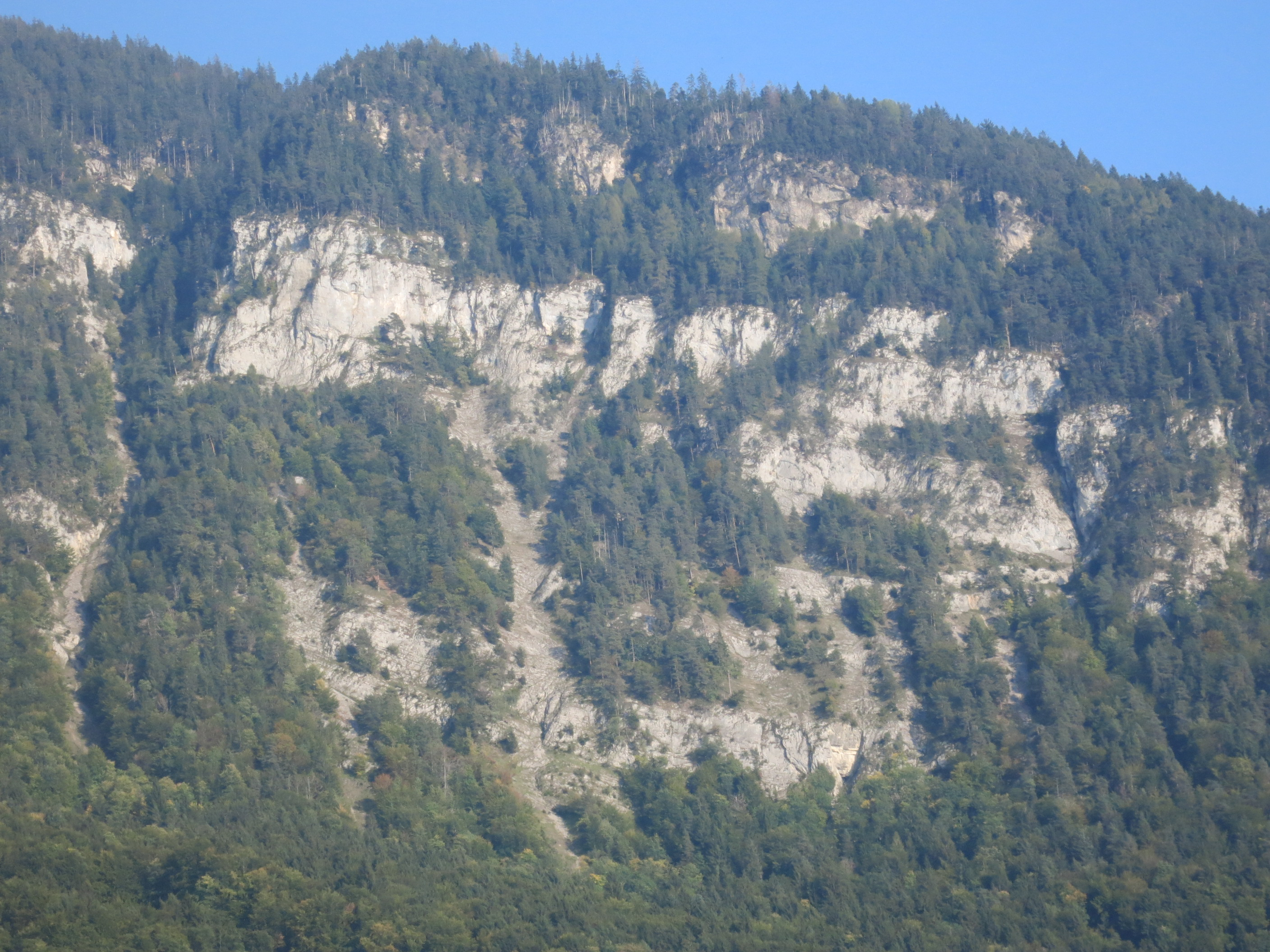 Artilleriewerk Waldbrand, Beatenberg BE, Schweiz